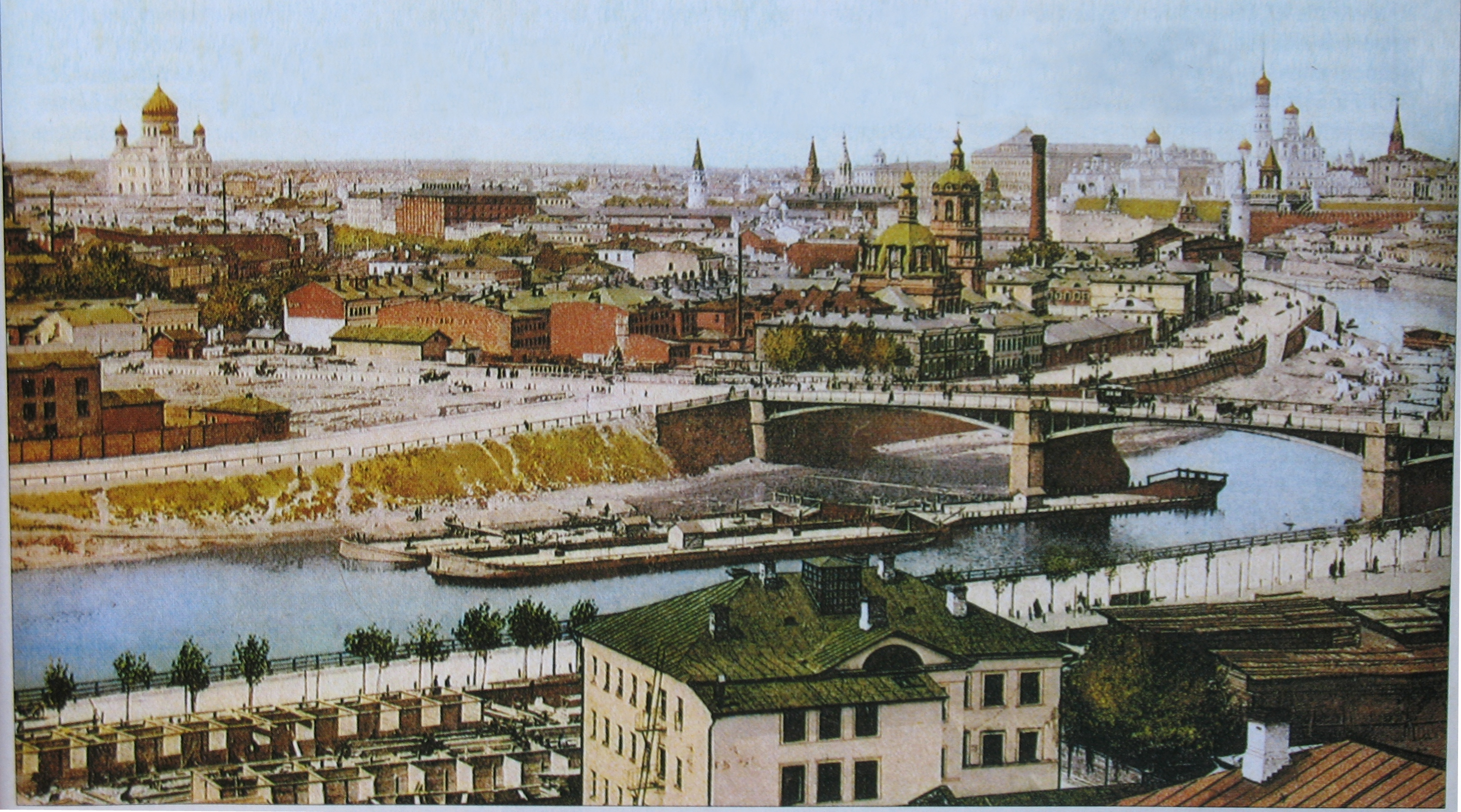 Фрагмент цветной панорамы Москвы с Храмом Христа Спасителя, опубликованной в 1912 году. Фотография. Вид вверх по течению Москва-реки.